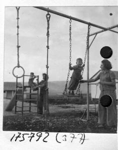 קיבוץ דברת 1950